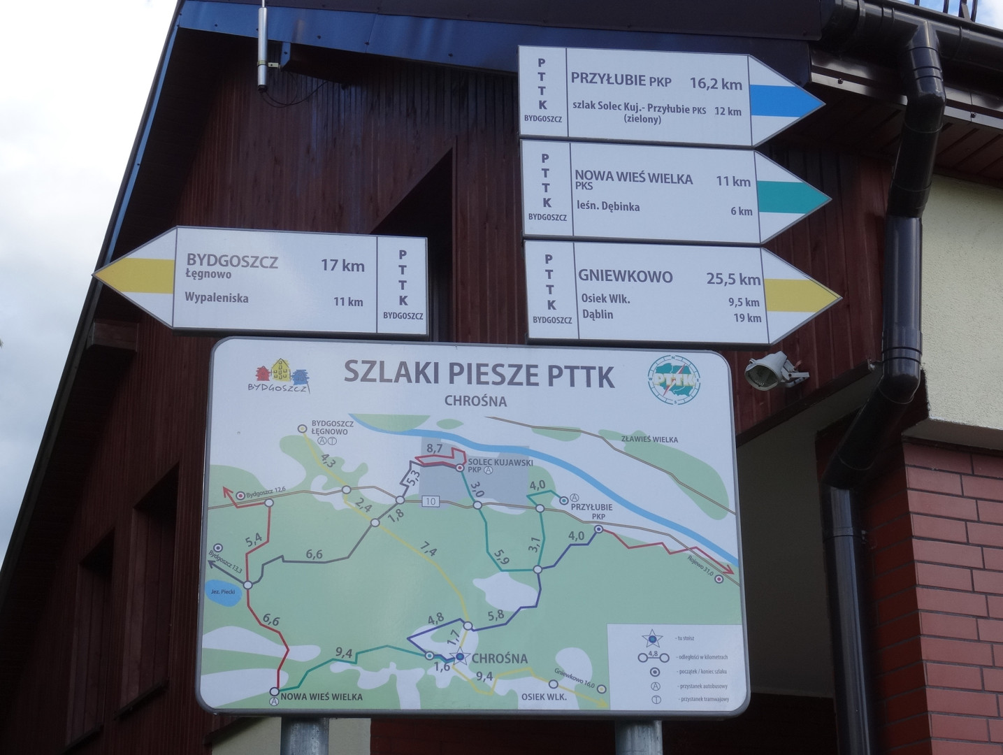 Wieś Chrośna w Puszczy Bydgoskiej, gmina Solec Kujawski